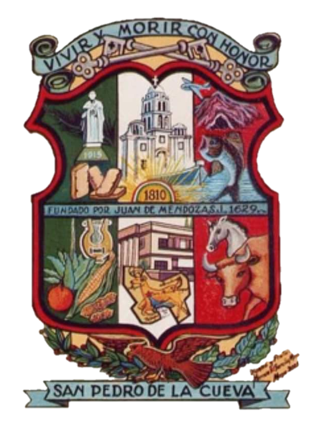 Escudo del municipio sonorense.